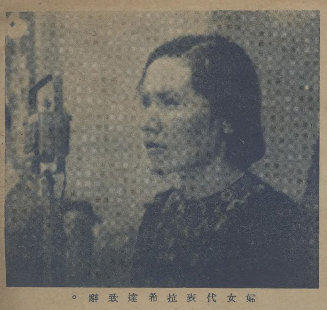 中文（中国大陆）: 迪化各界慶祝和平大會盛況